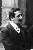 O escritor Graça Aranha, em Roma, em 1904